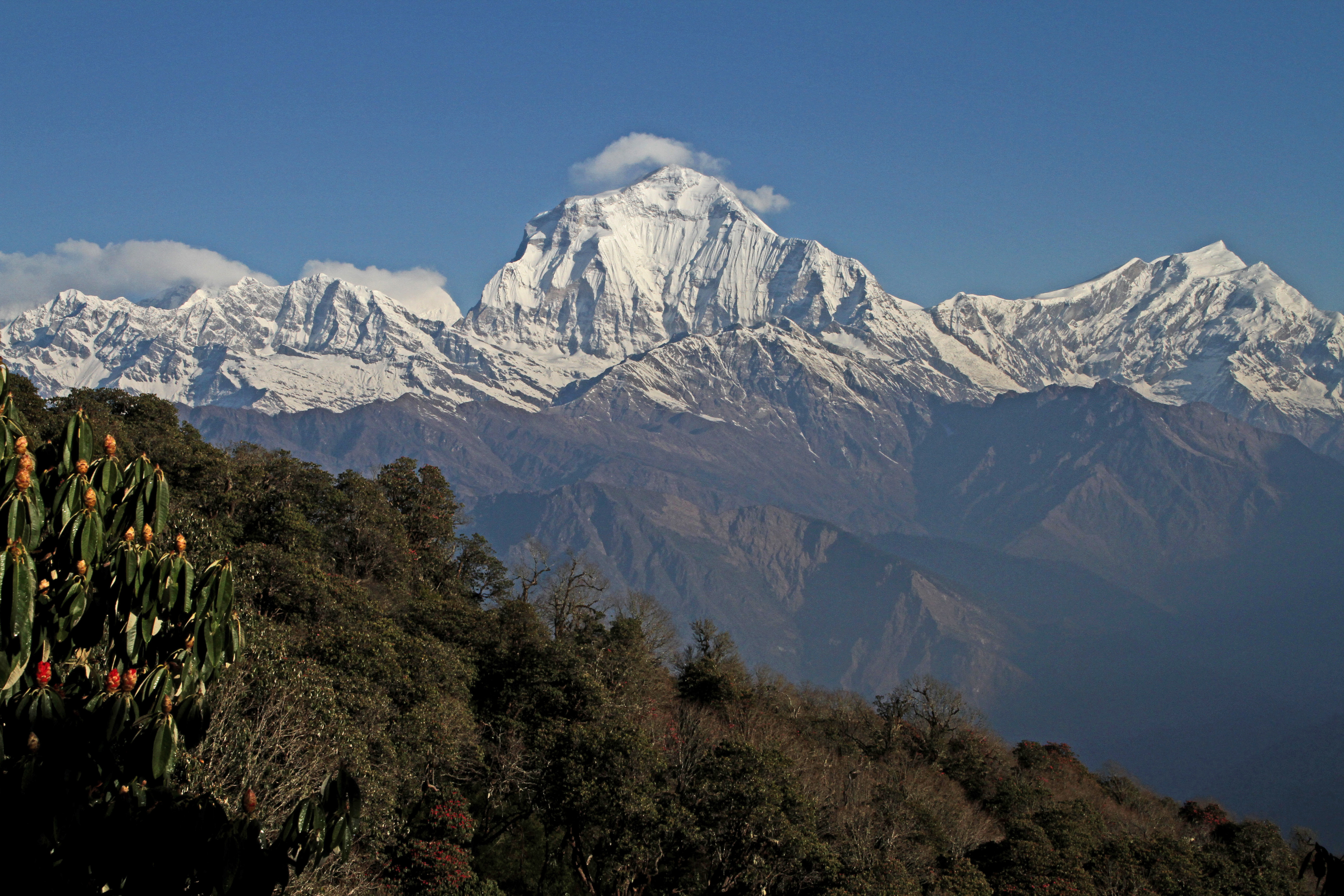 Poon Hill in Nepal